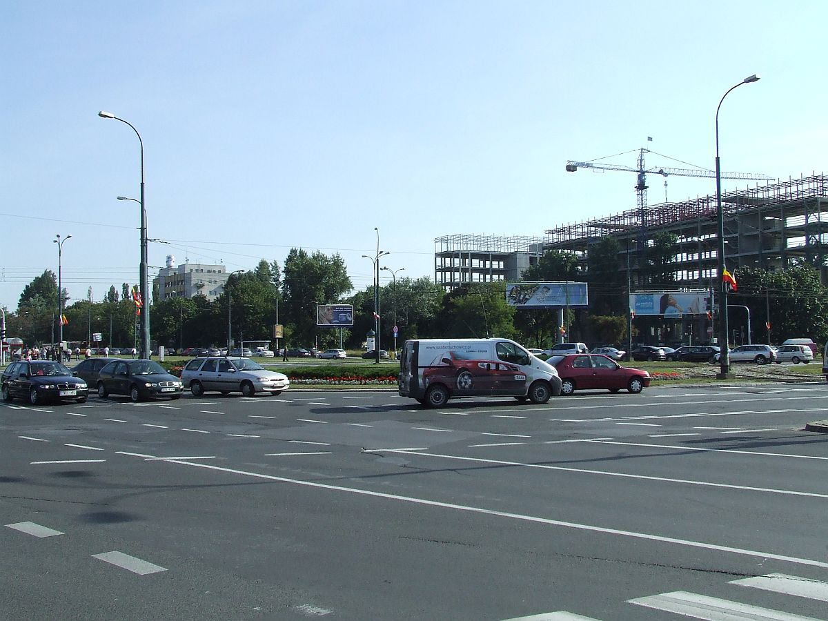 Rondo Ignacego Daszyńskiego w Warszawie, Warsaw